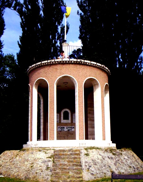 Türr István emlékmű és kilátó Baján